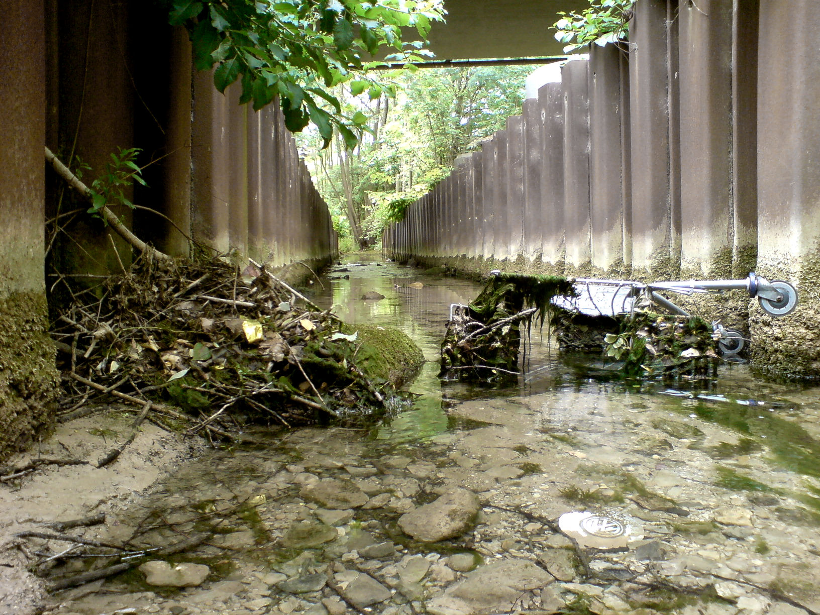 Stadtidyll an der Lutter (Schönen Dank).